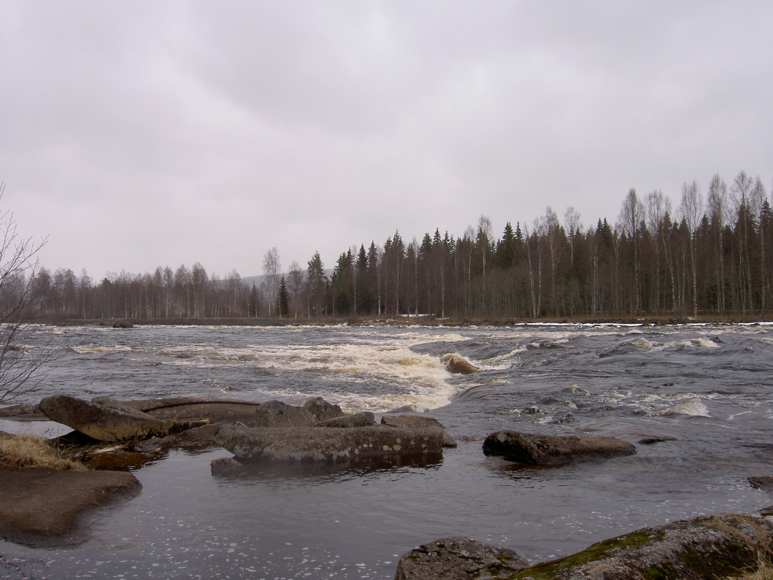 Fänforsen, Västerdalälven, Sverige/Sweden